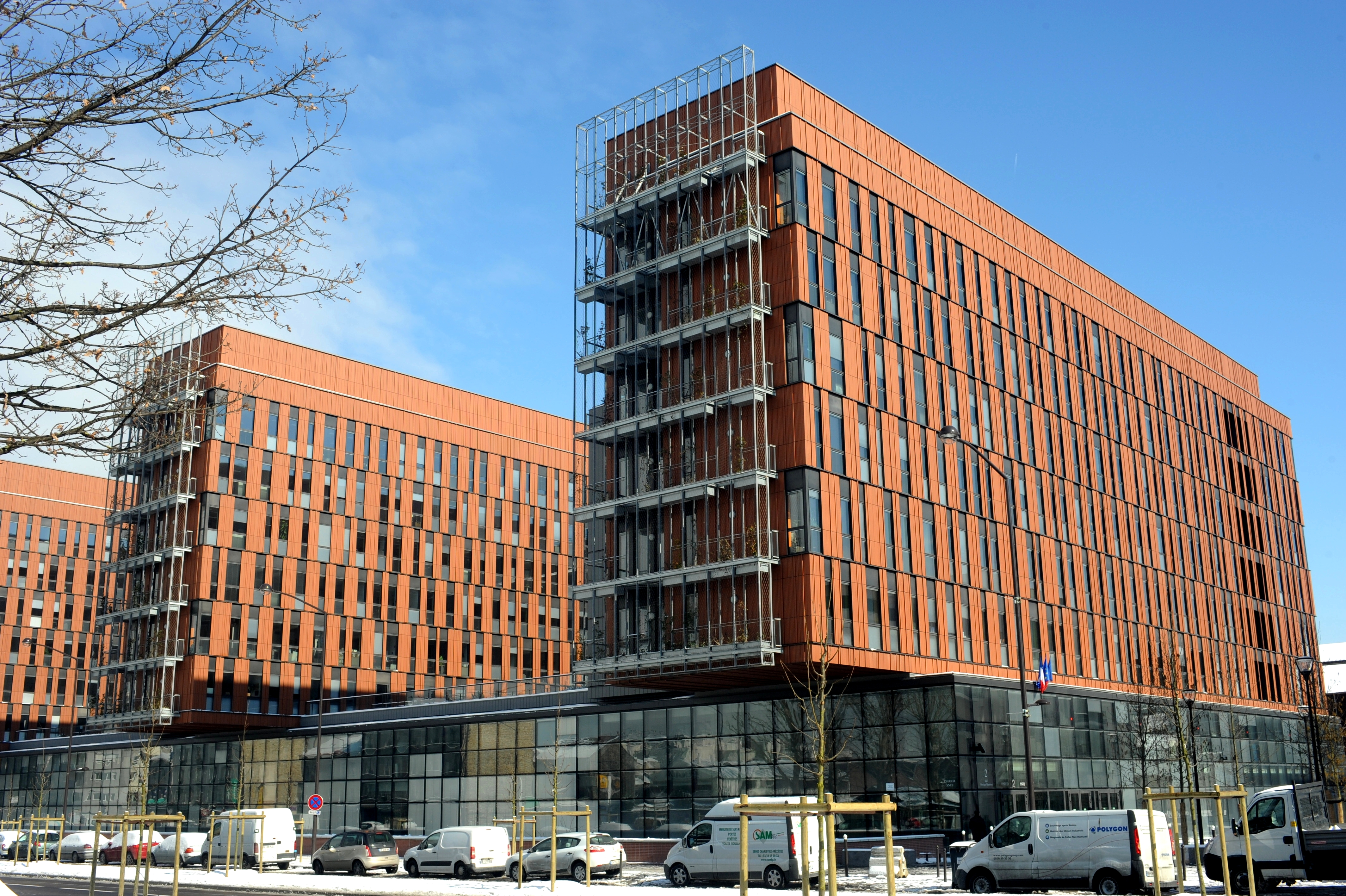 Siège de la DNRED à Ivry sur Seine